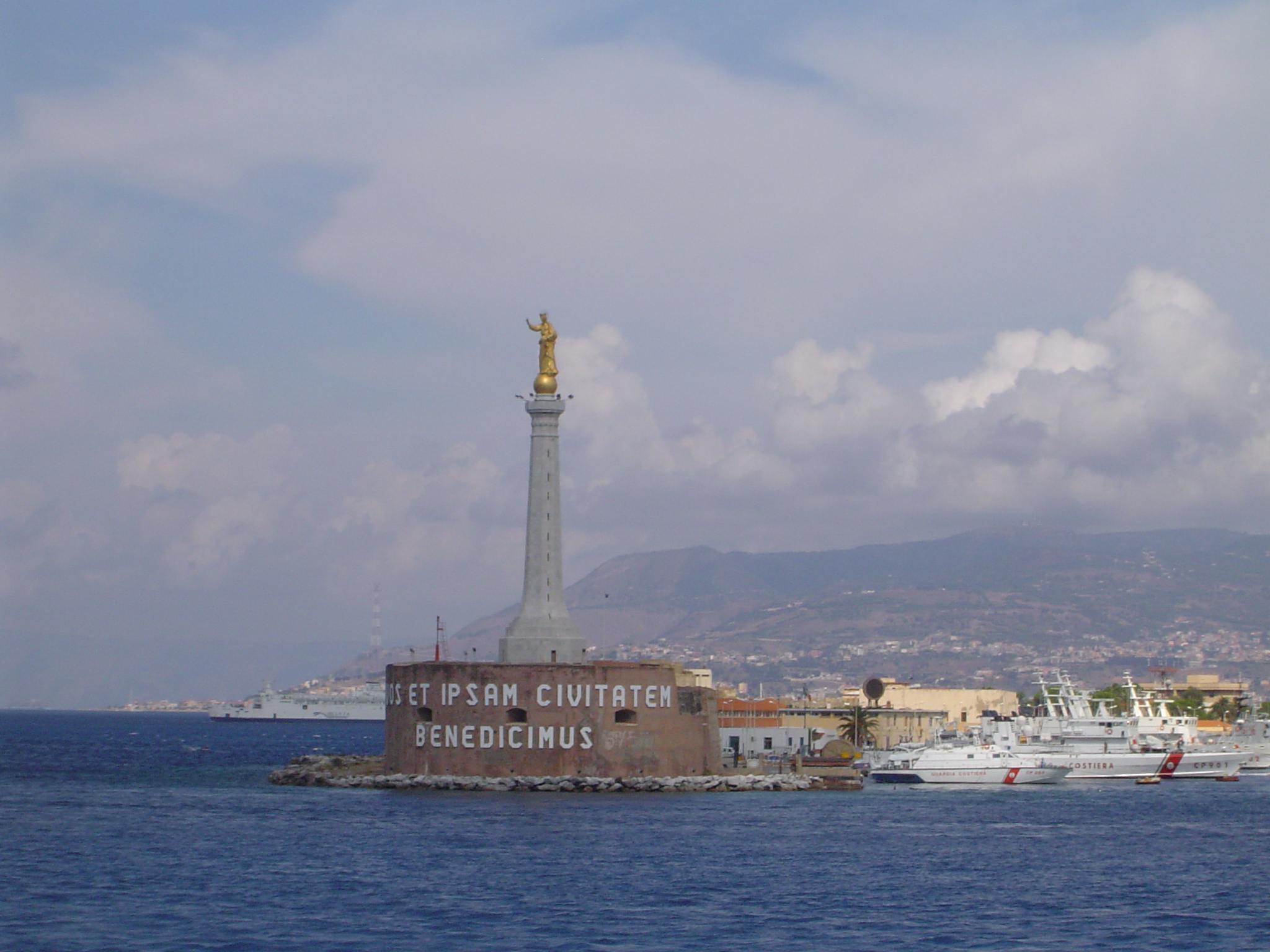 Am Hannergronn: d'Strooss vu Messina, vu Messina aus gesinn (2005).